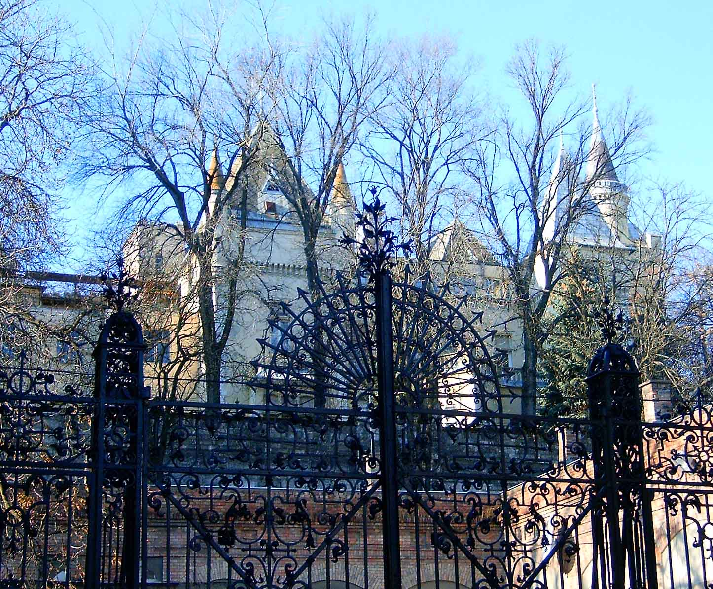 Törley-kastély This is a photo of a monument in Hungary, Identifier: 11684